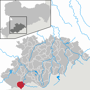 Johanngeorgenstadt im Erzgebirgskreis, Sachsen